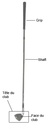 Composition d'un club de golf